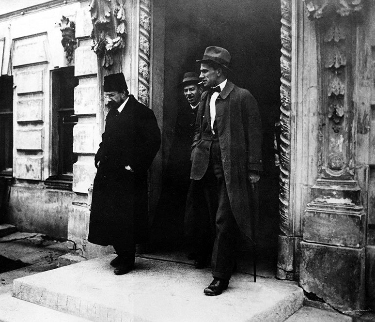 А. Луначарский и В. Маяковский. Московская редакция